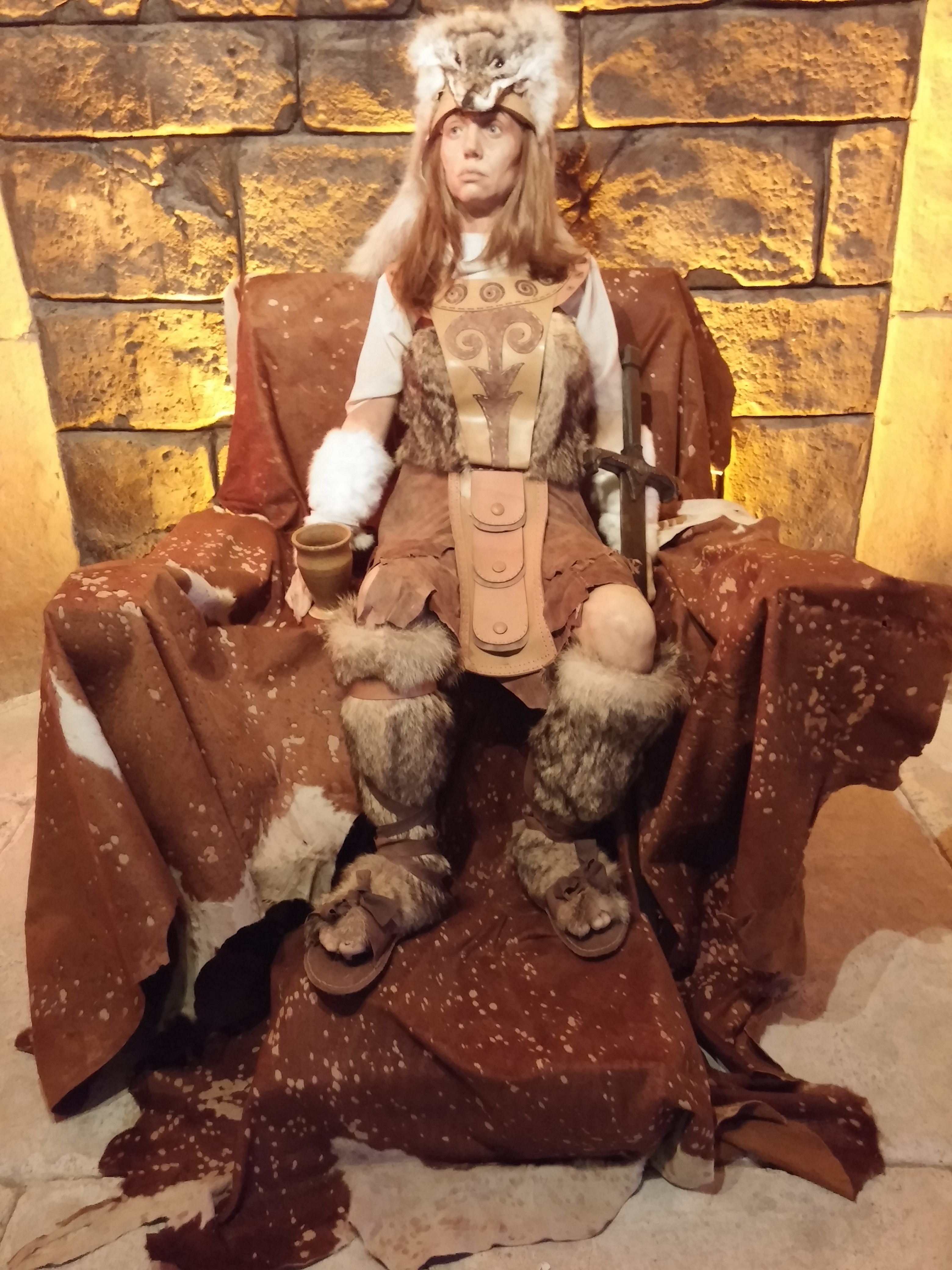 Samsun'un Atakum ilçesinde yer alan Amazon Köyü'ndeki Amazon Kraliçesi Hippolyte'in balmumu heykeli.